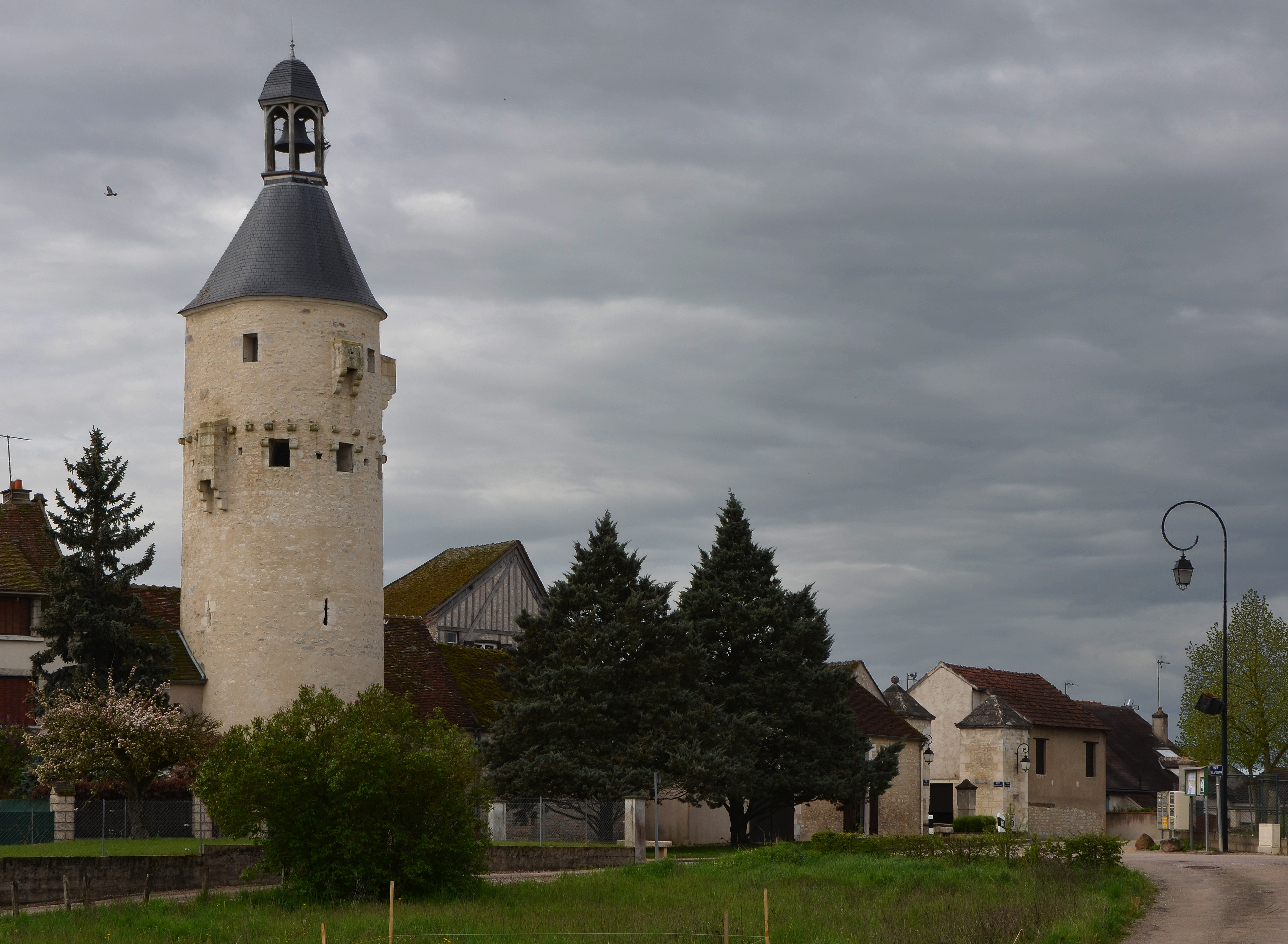 Beffroi de Cravant, Yonne, France